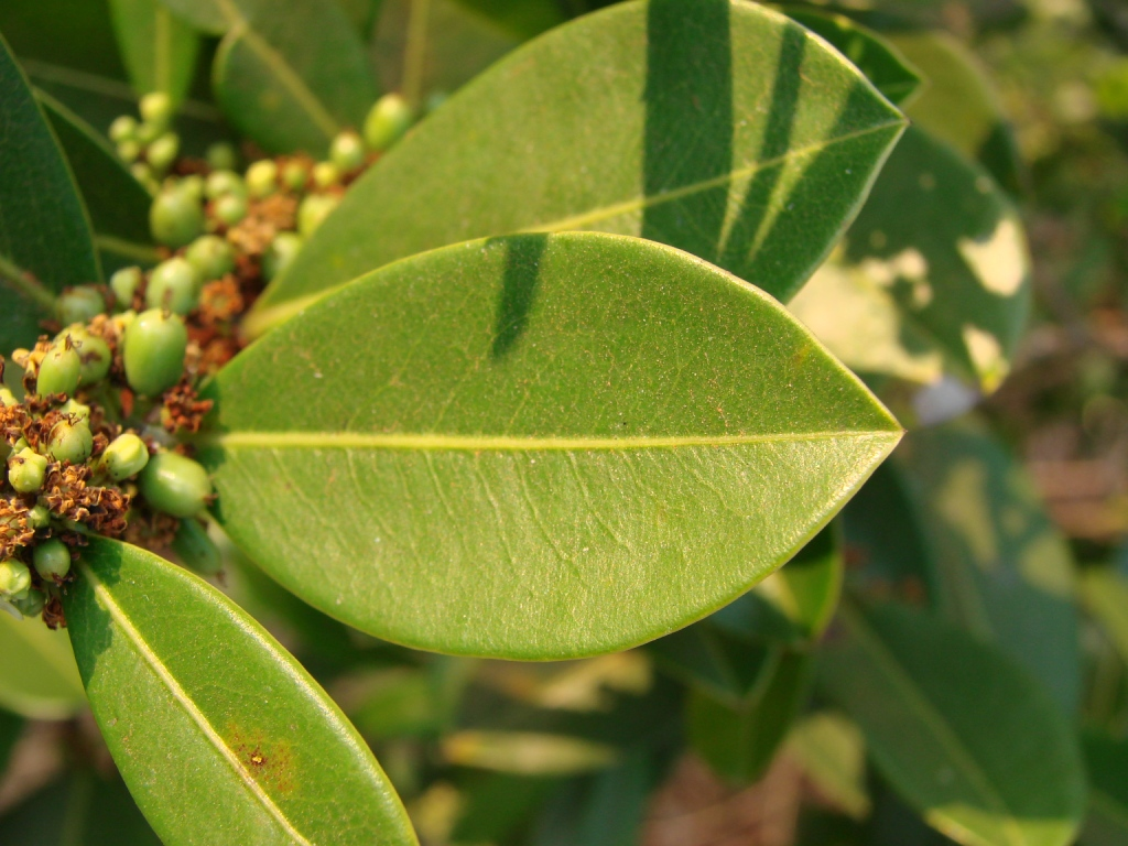 Erythroxylum citrifolium -ERYTHROXYLACEAE - Parque Olhos D'Água - Brasília - Distrito Federal - Brasil.